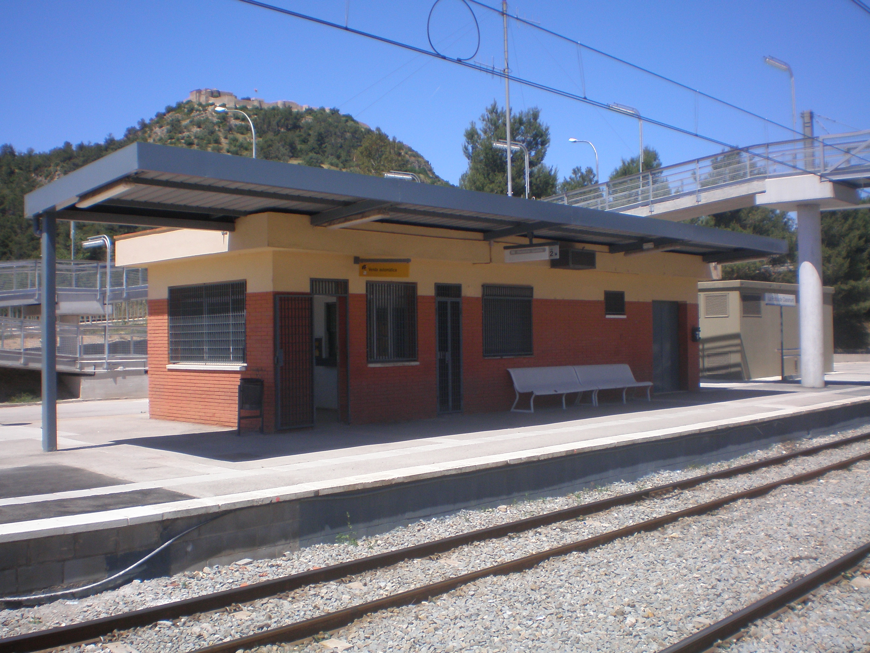 Edifici de viatgers de la Pobla de Claramunt